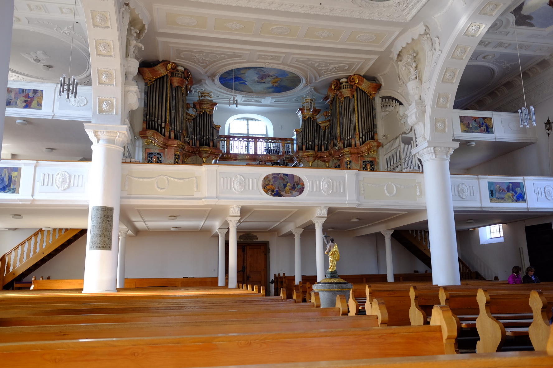 Wasserburg St Georg